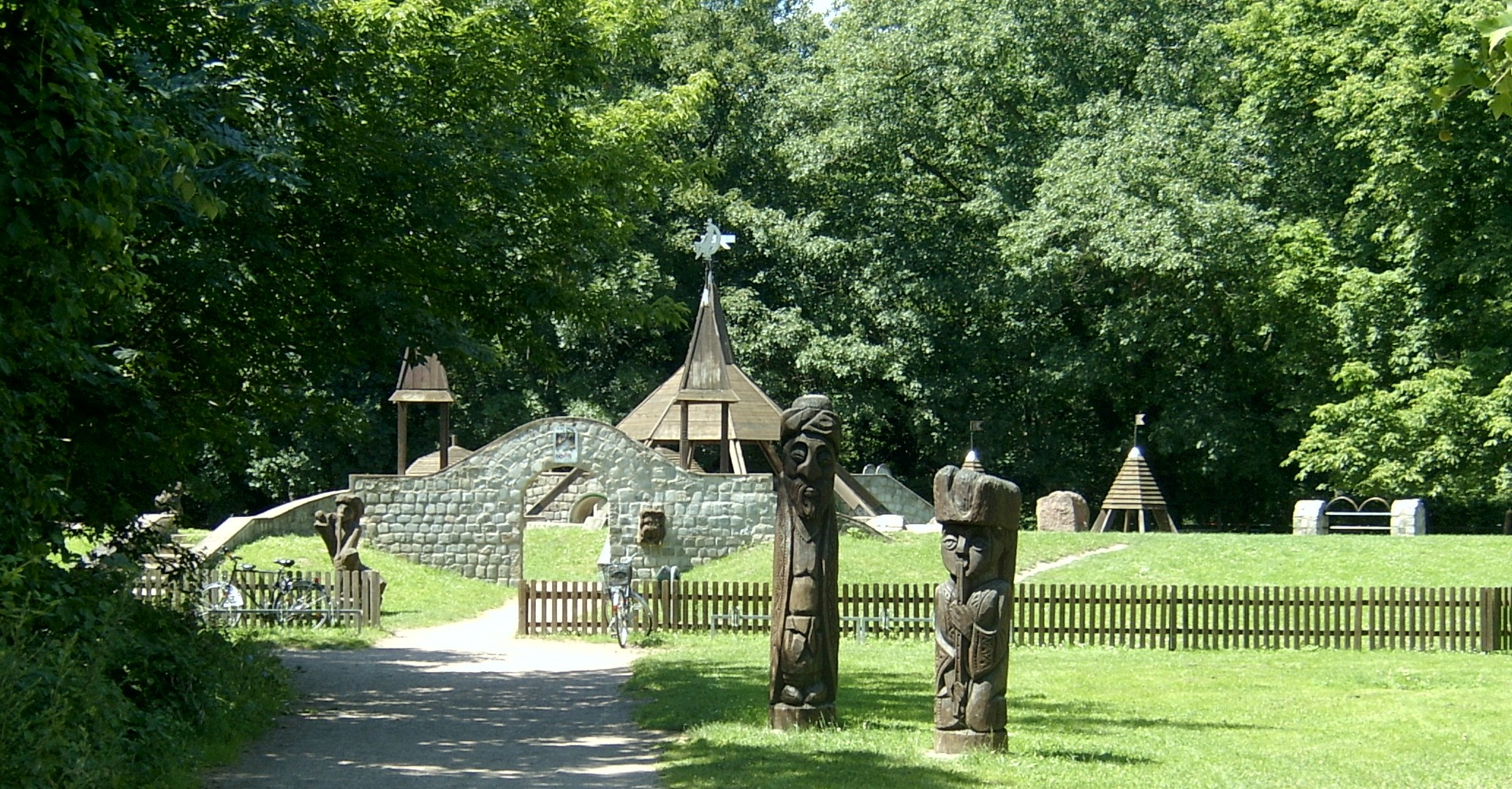 Spielplatz auf der Peißnitz in Halle (Saale)